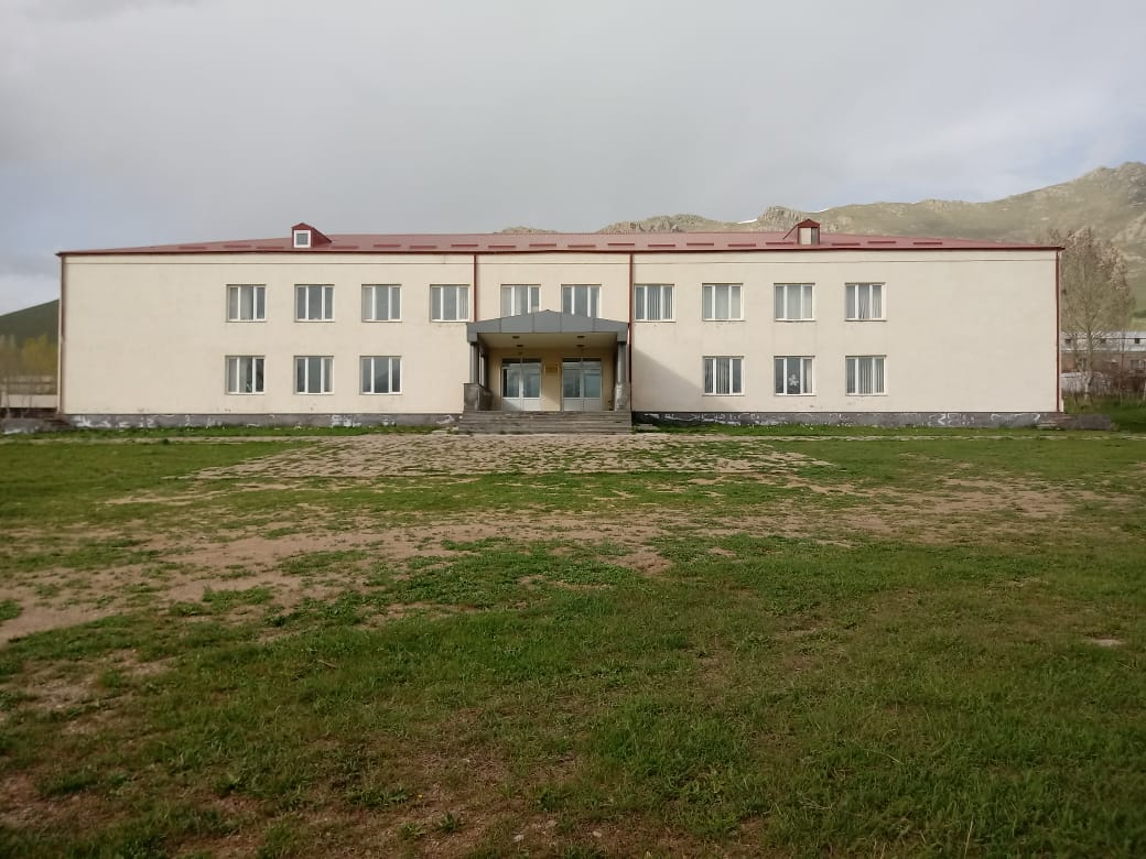 Մելիքգյուղի միջնակարգ դպրոց